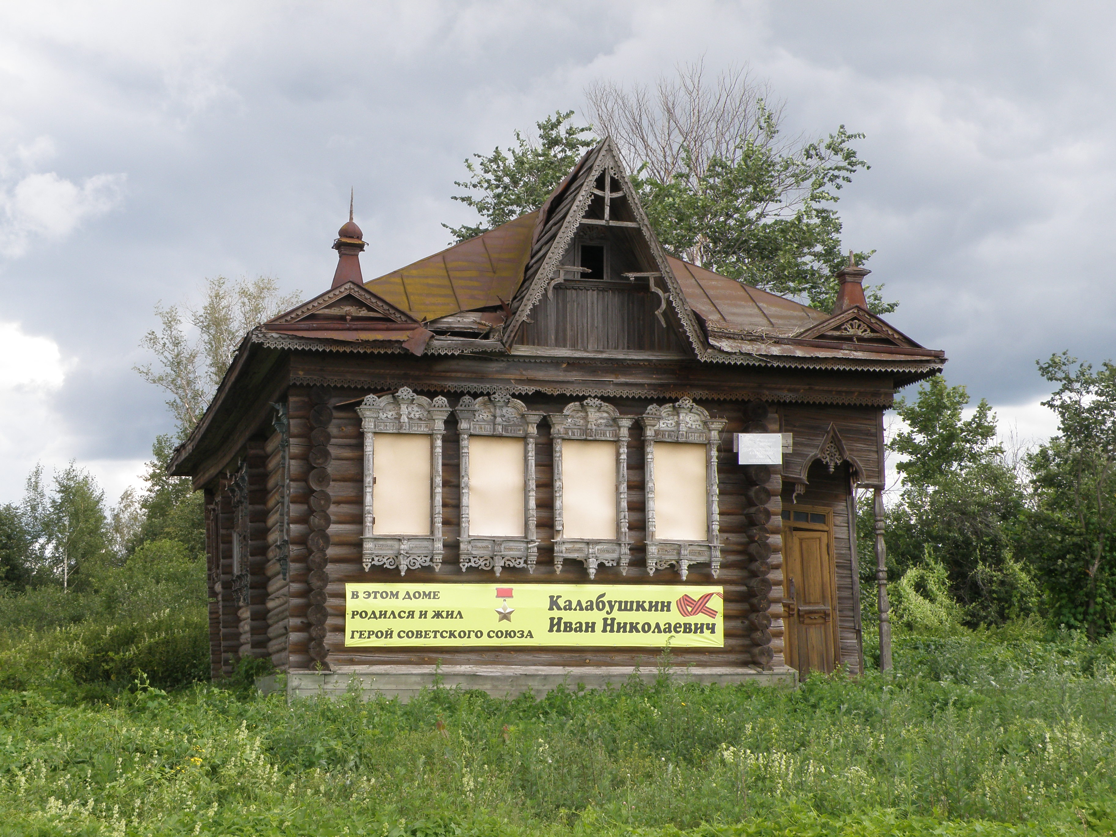 Дом Калабушкина в д. Спудни